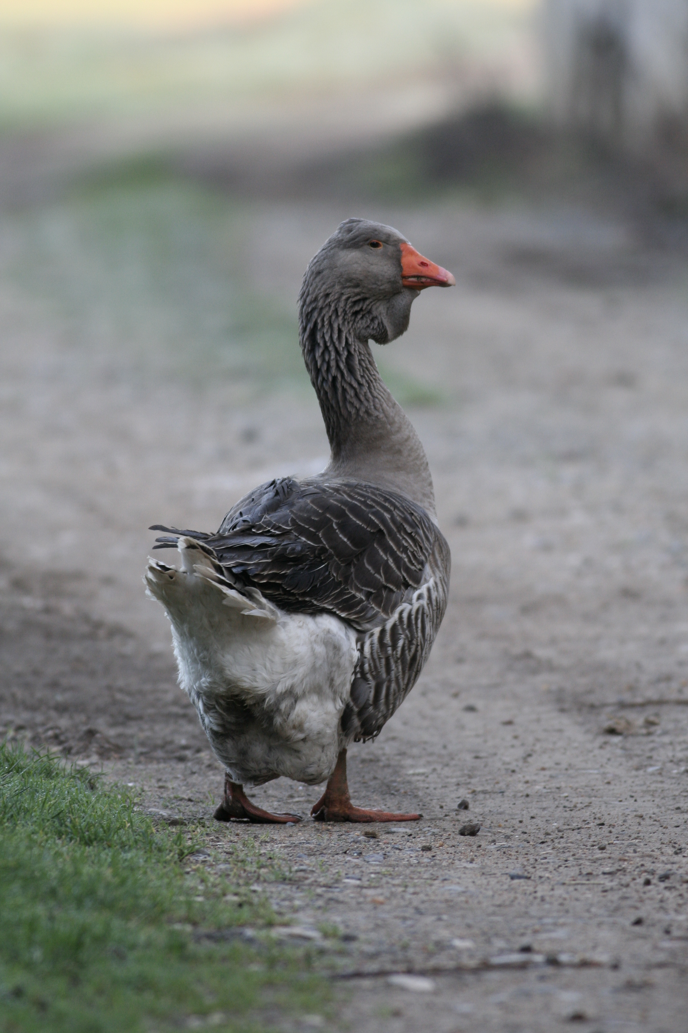 oie